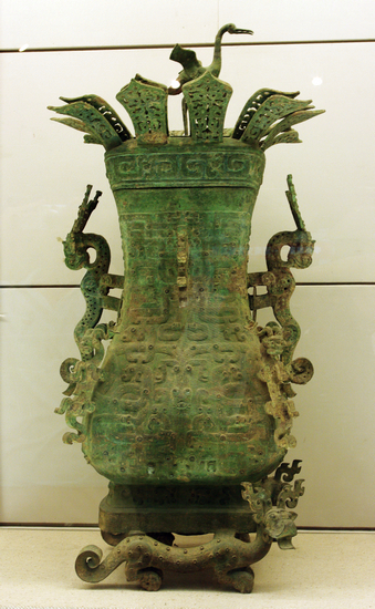 河南博物院藏莲鹤方壶